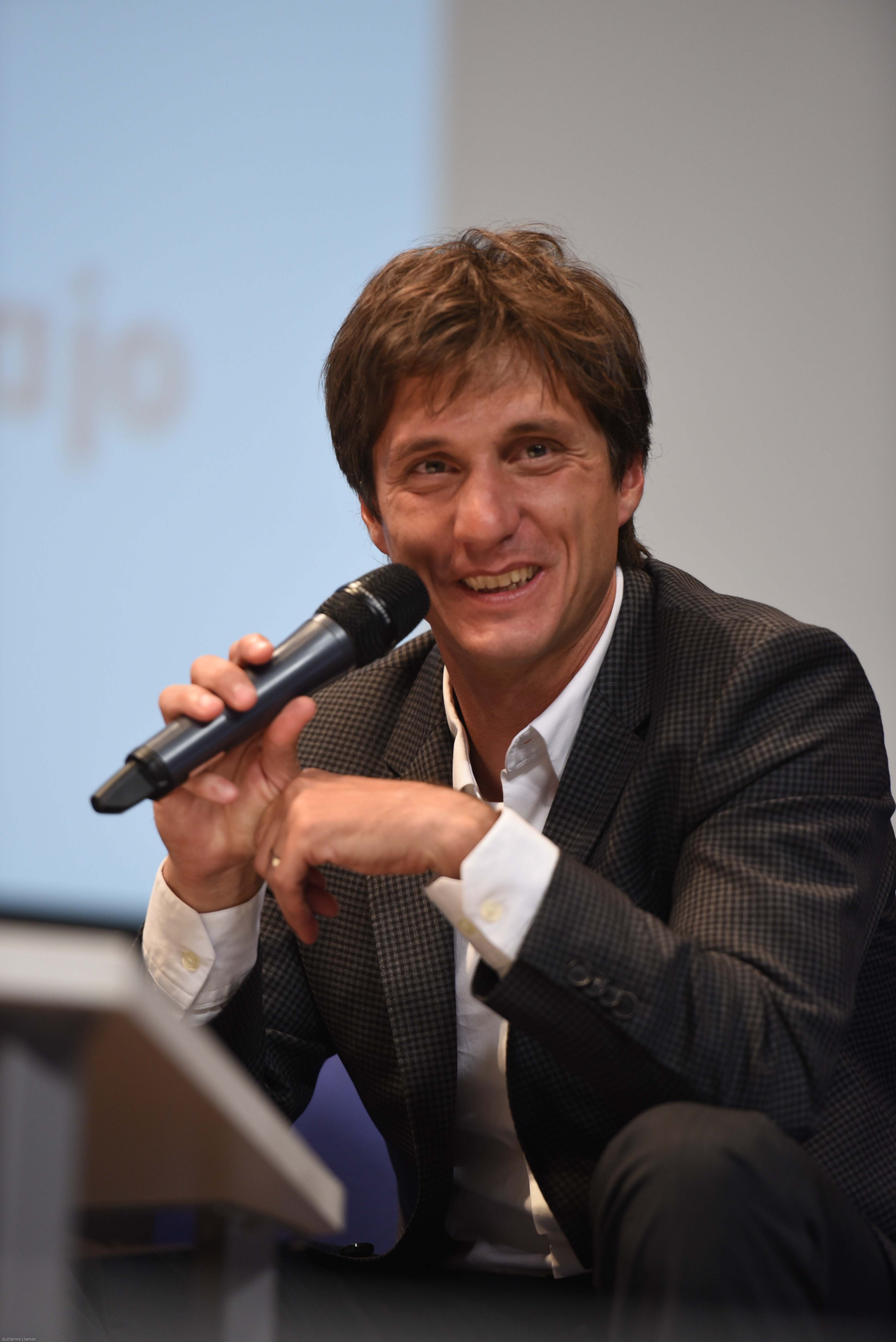 Los mellizos Guillermo y Gustavo Barros Schelotto fueron los protagonistas de la Tercera Charla Magistral de Deportes en la UMET. Con la moderación de Horacio Pagani y la presencia de Víctor Santa María, estos referentes del futbol argentino contaron sus experiencias y proyectos. Mi sitio